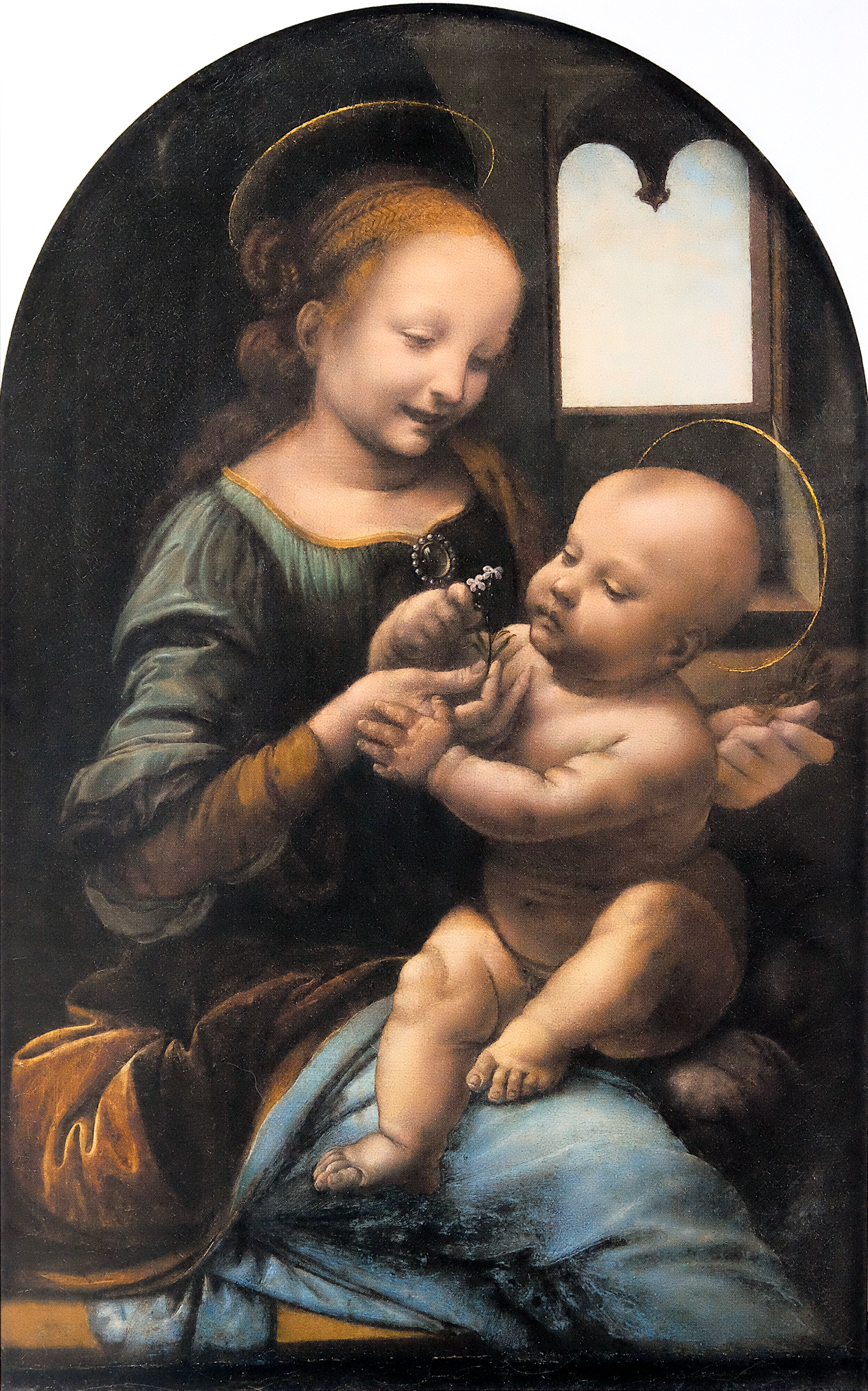 Madonna Benois, Leonardo, um 1477